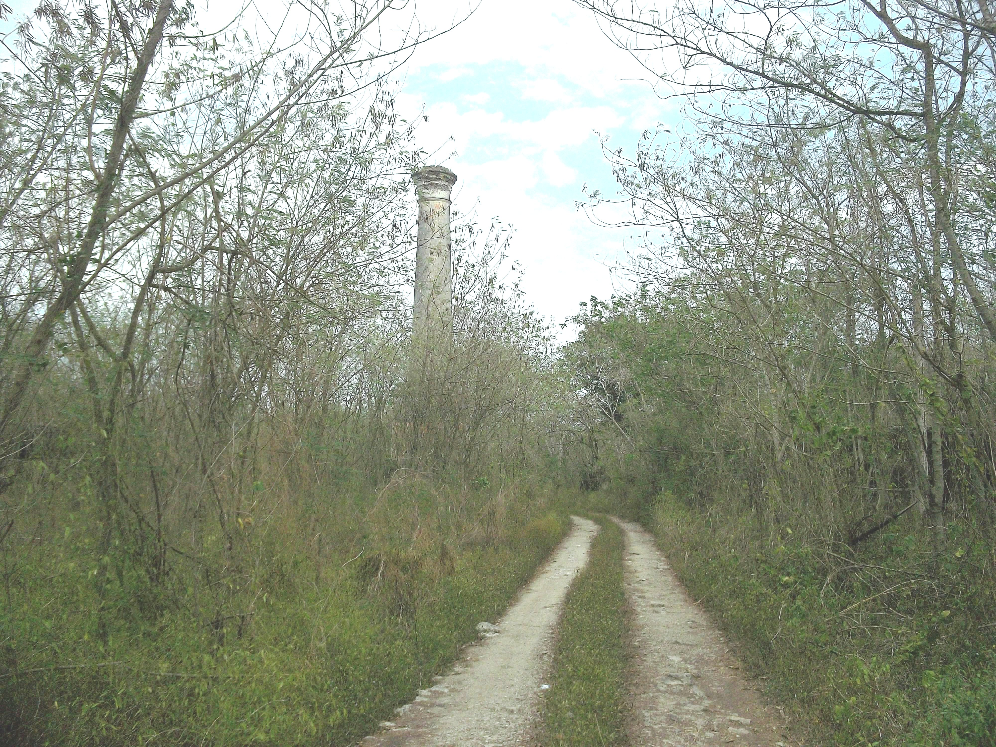 Vista de San Antonio Holcá, Yucatán.